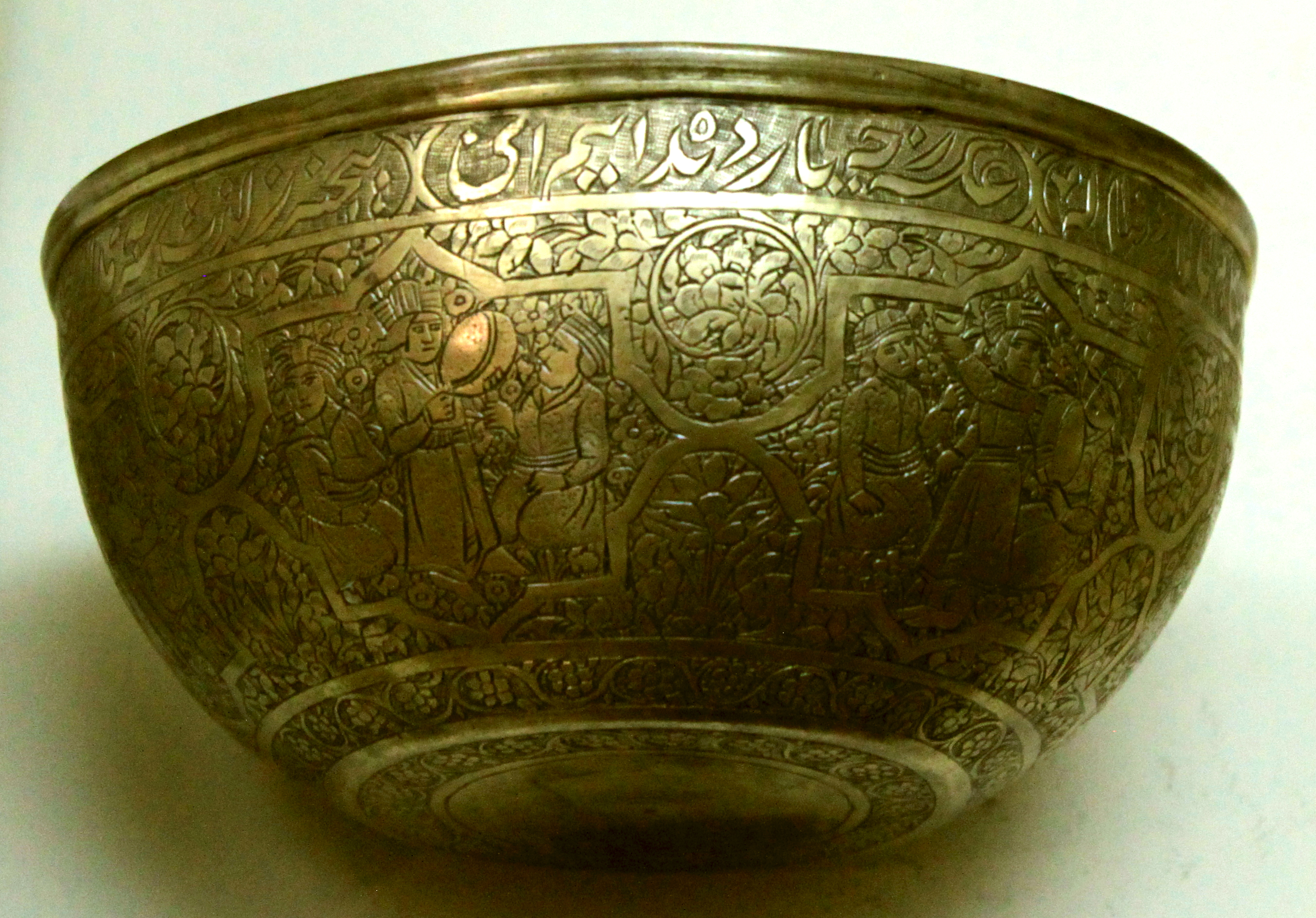 Səfəvilər dövrünə aid mis cam